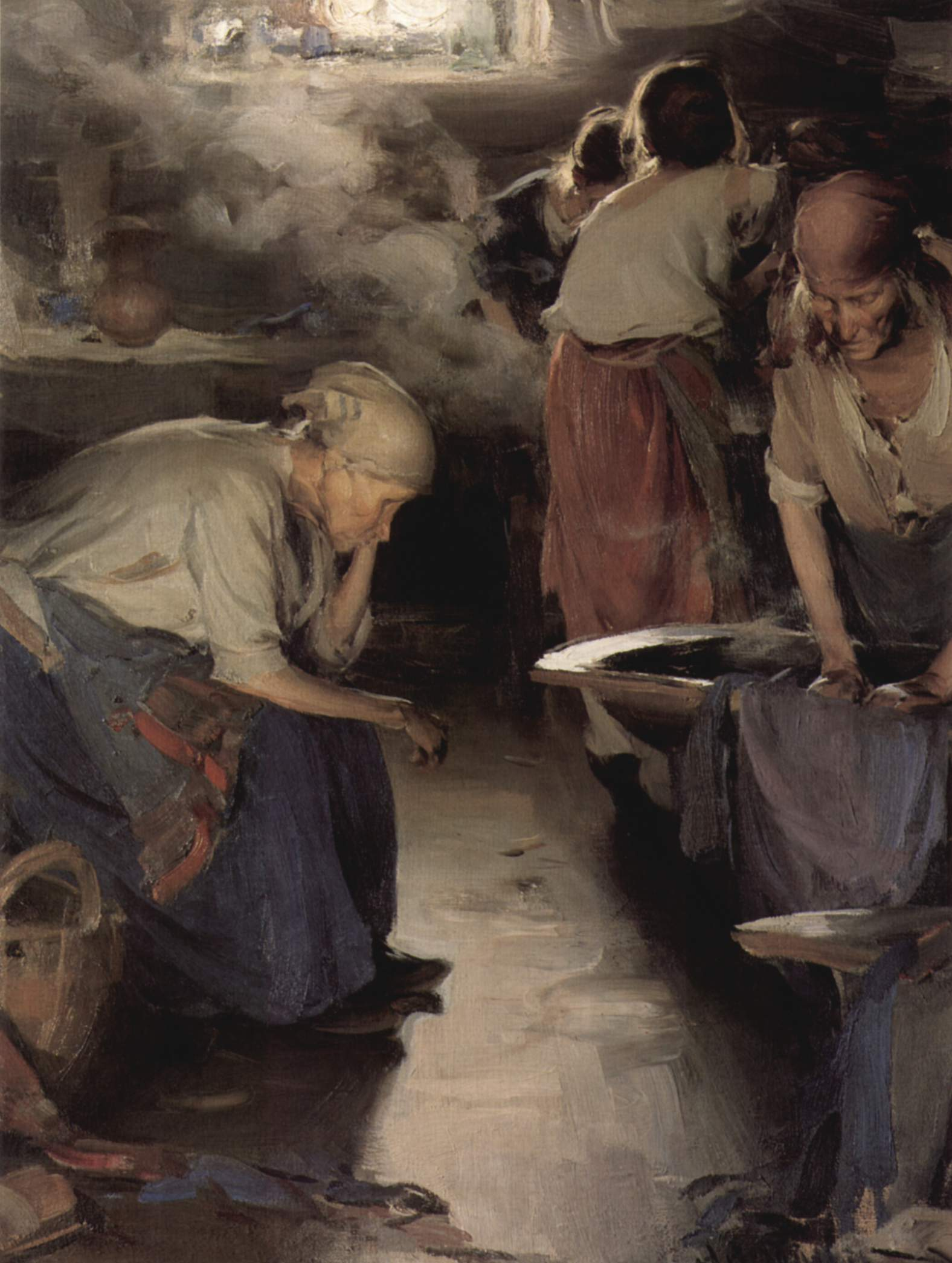 (2nd version)